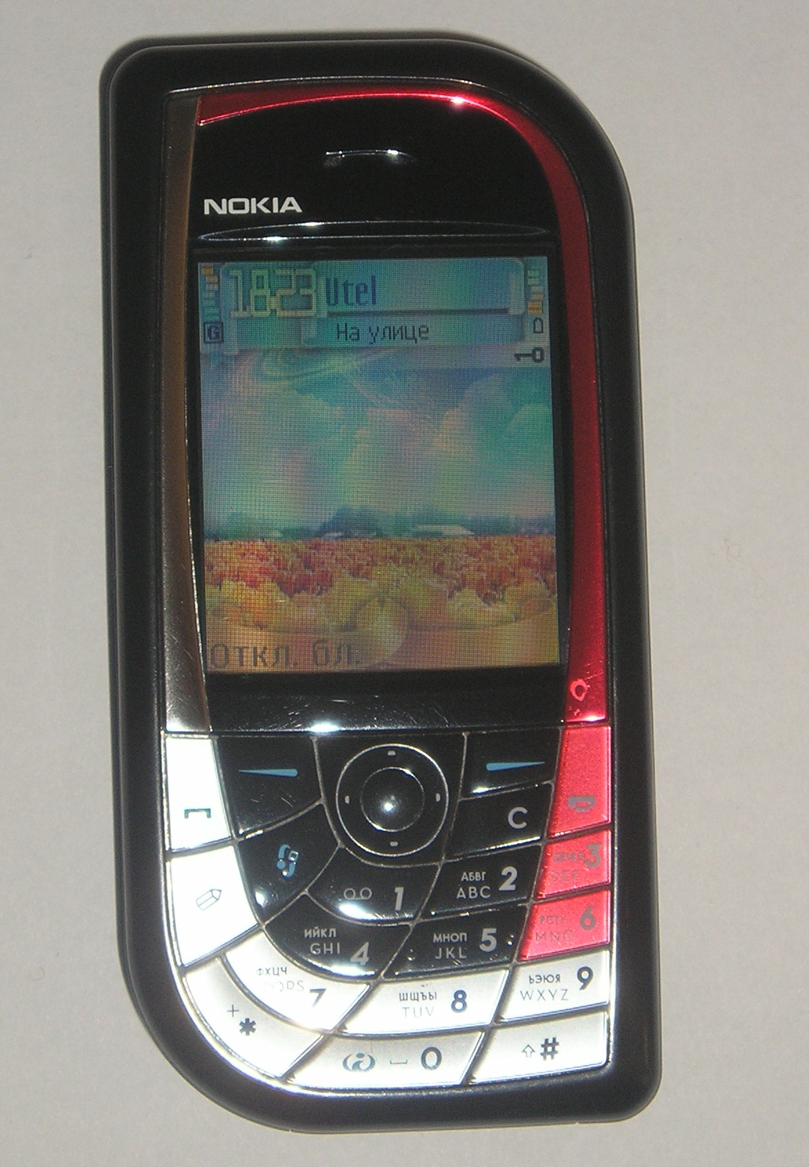 Nokia 7610